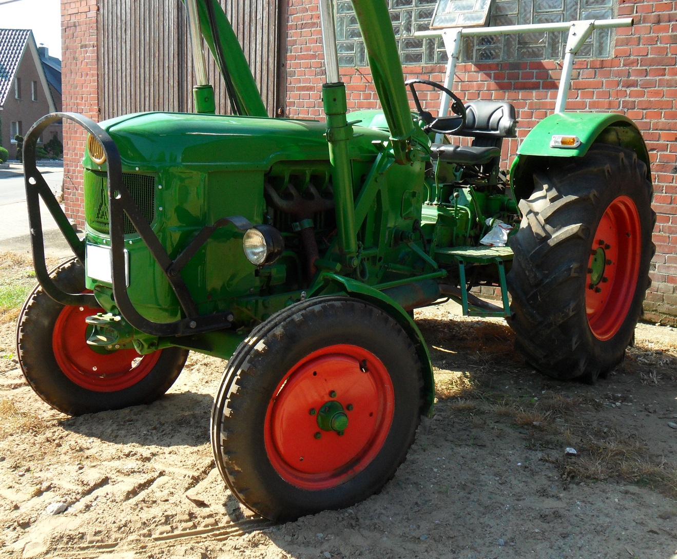 Deutz D 5505 mit 52 PS